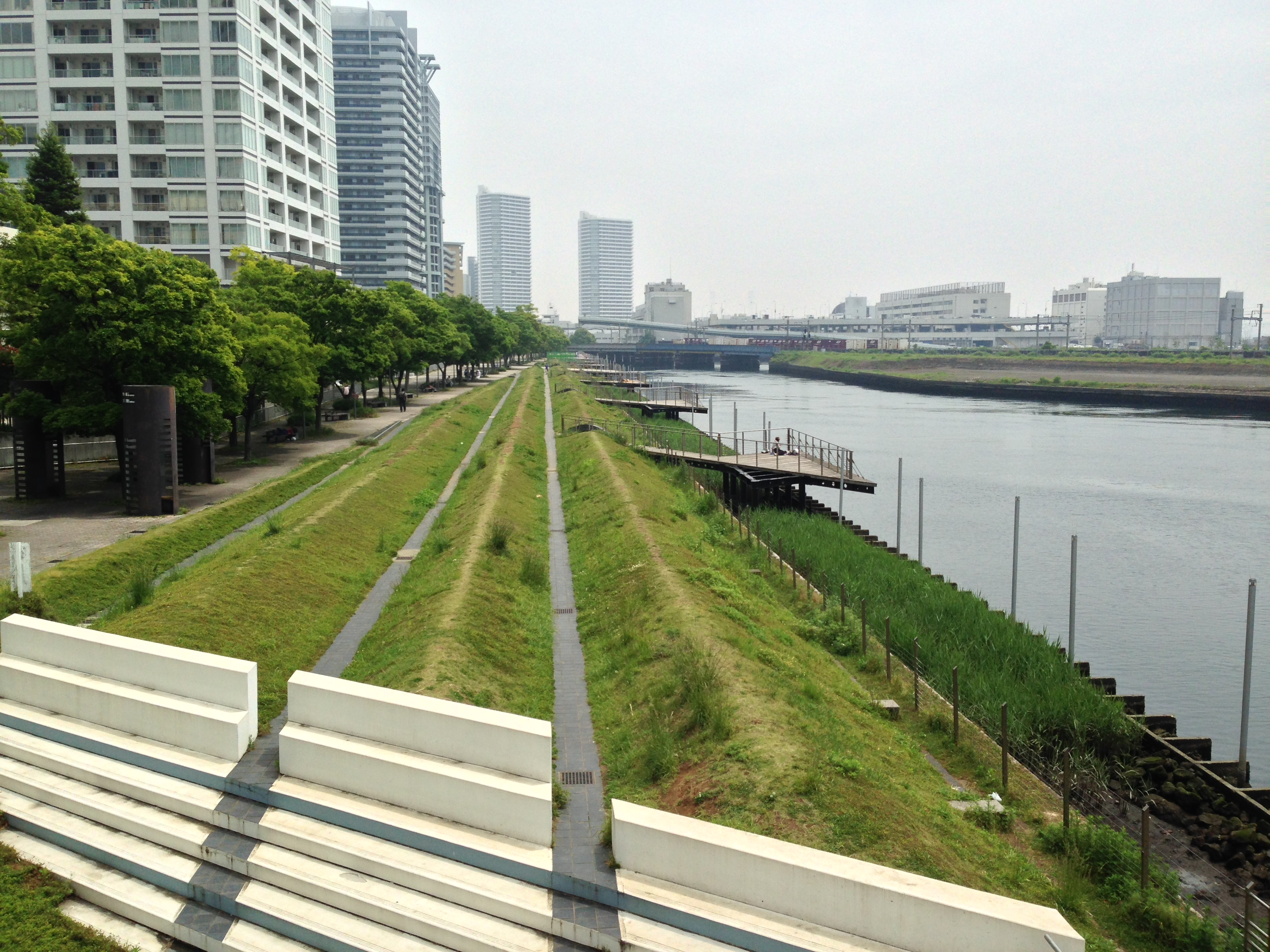 ヨコハマポートサイド地区の帷子川沿いに広がる「ポートサイド公園」。対岸にはみなとみらい地区の高島水際線公園がある。